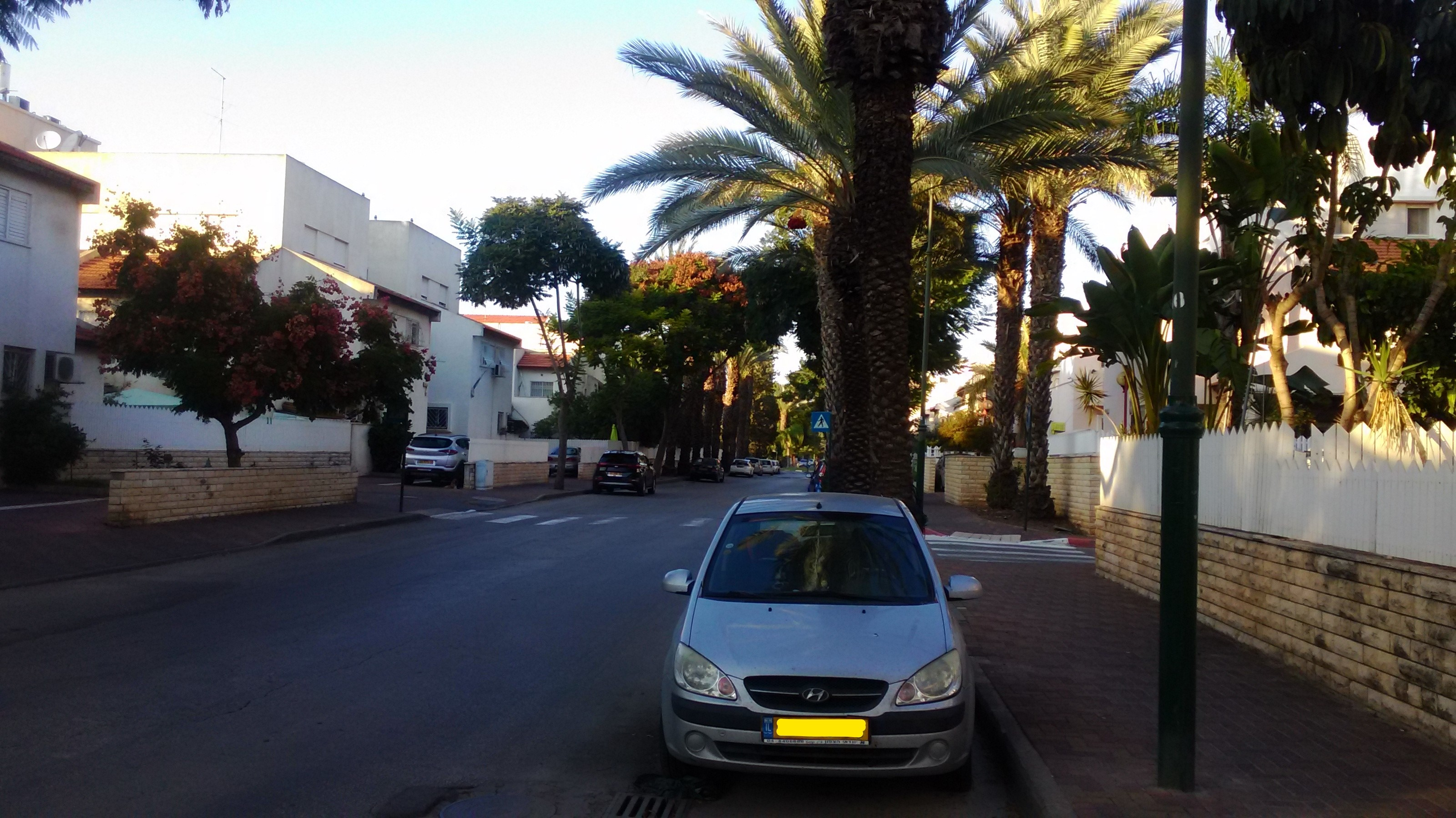 רחוב חיים בשכונה